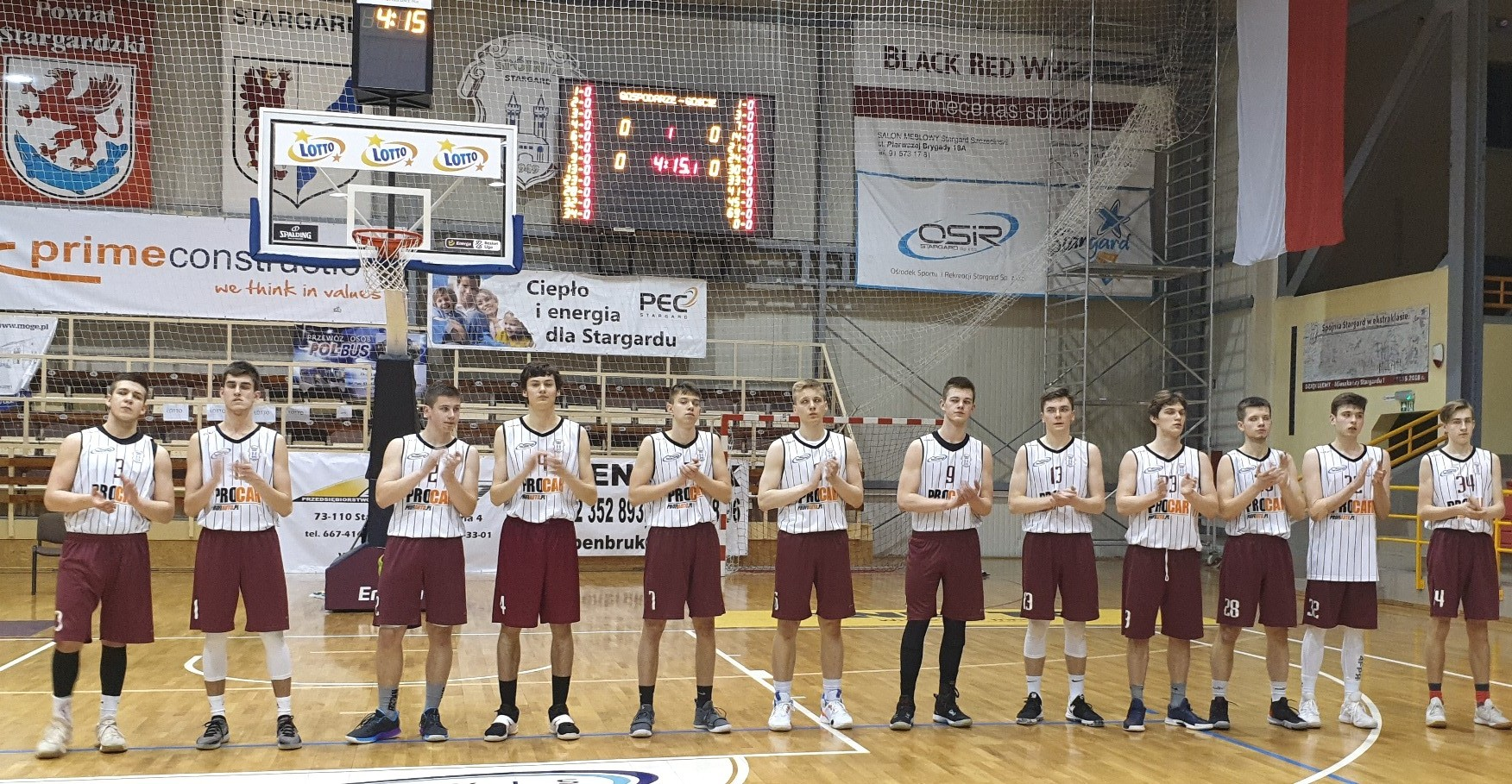 Spójnia Stargard U-18